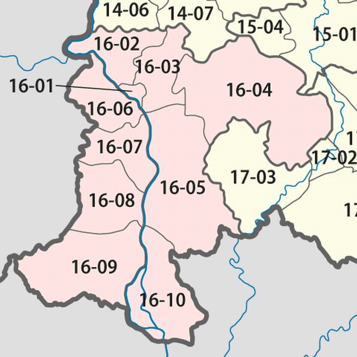 Giấy phép